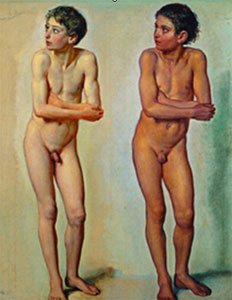 А.А.Иванов. Обнажённый мальчик. Эскиз. 1830-1840-е.